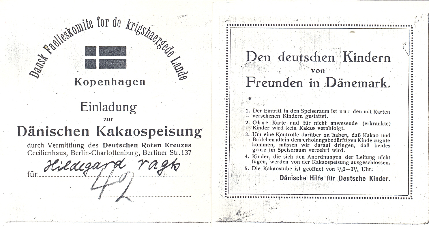 Dansk Help for Children 1946 (?) Berlin